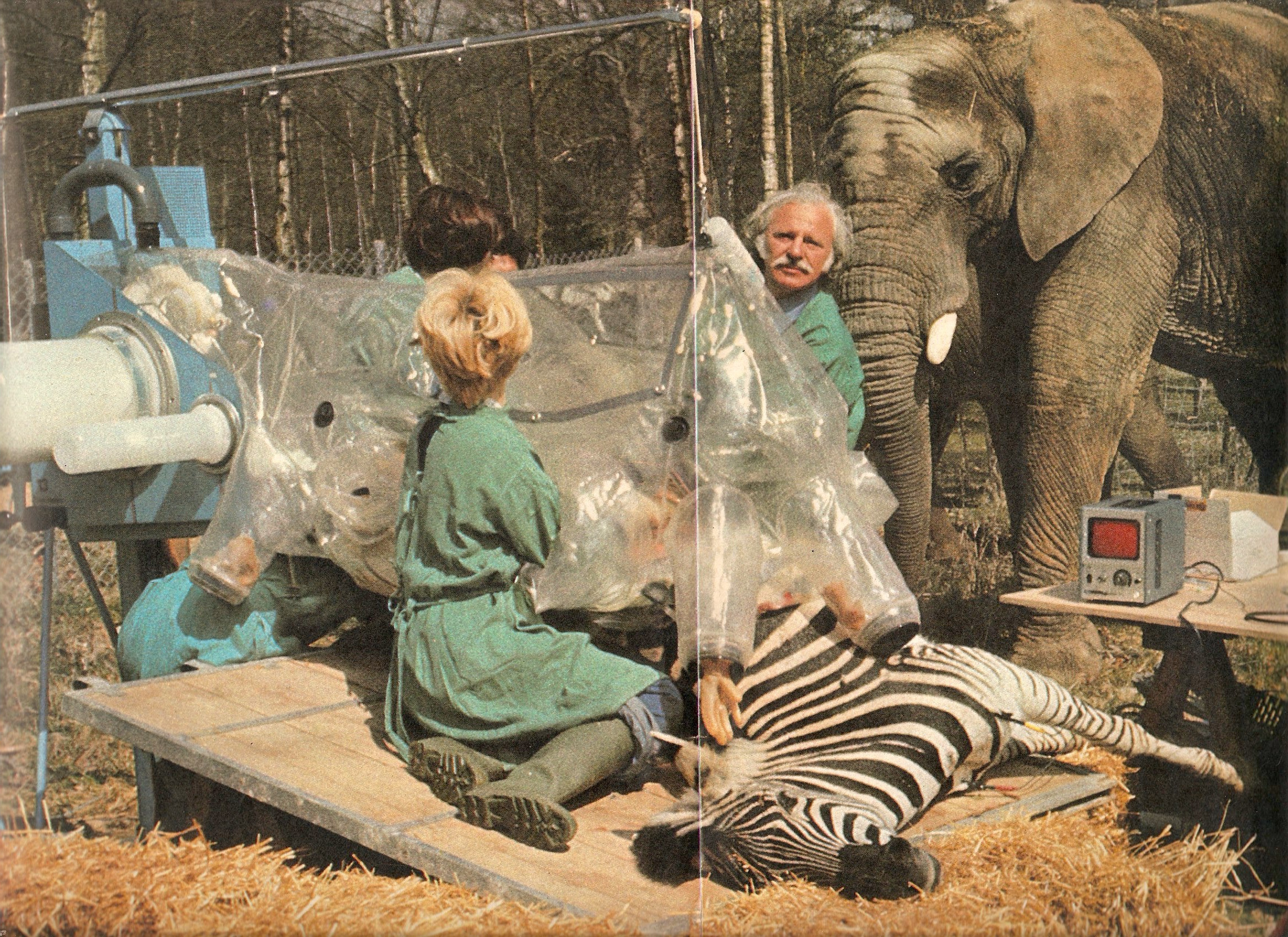 Intervention de terrain sous bulle stérile par Michel Klein au zoo de Thoiry